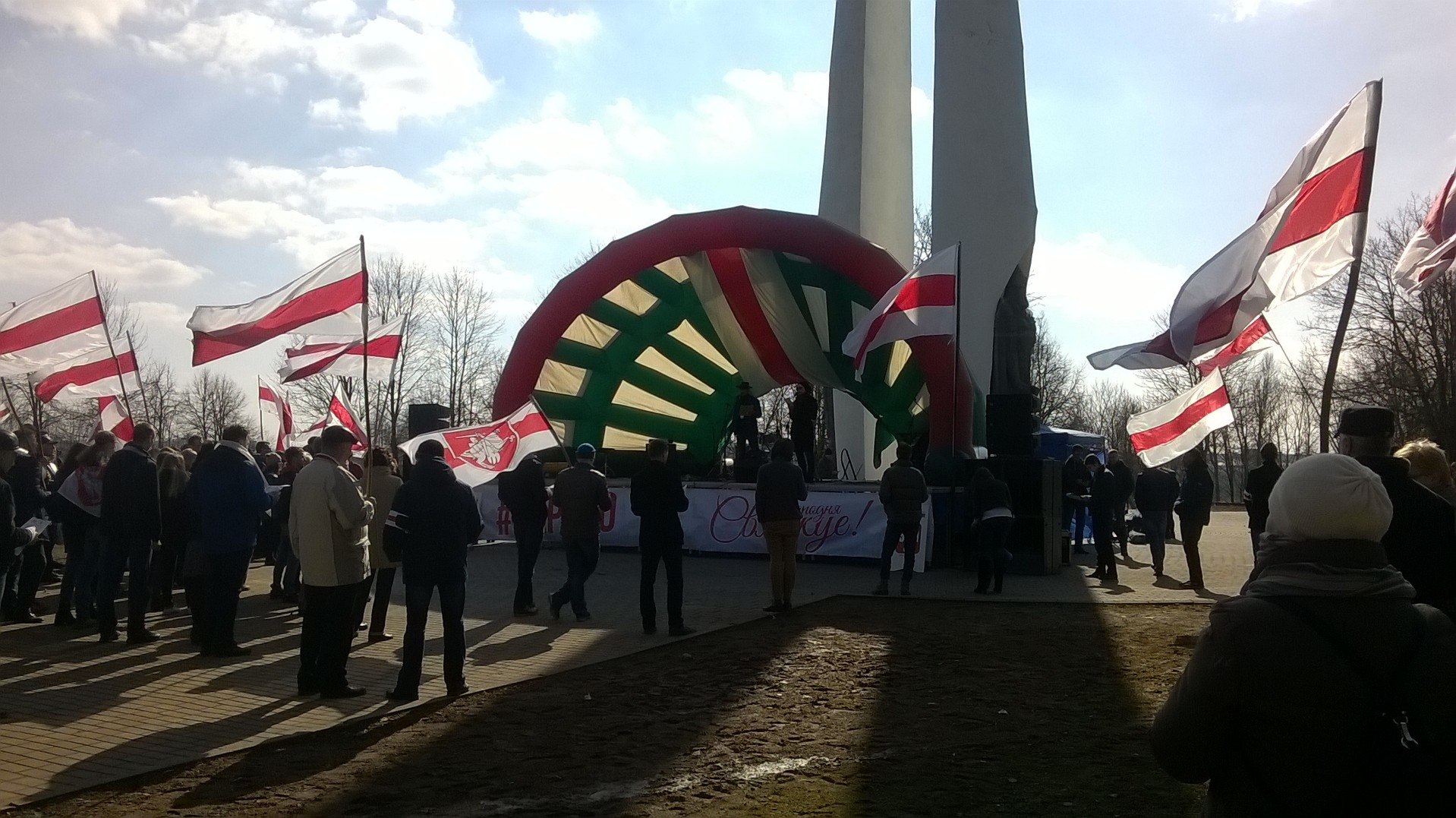 Гродна, Каложскі парк, 25 сакавіка 2018 (#БНР100)